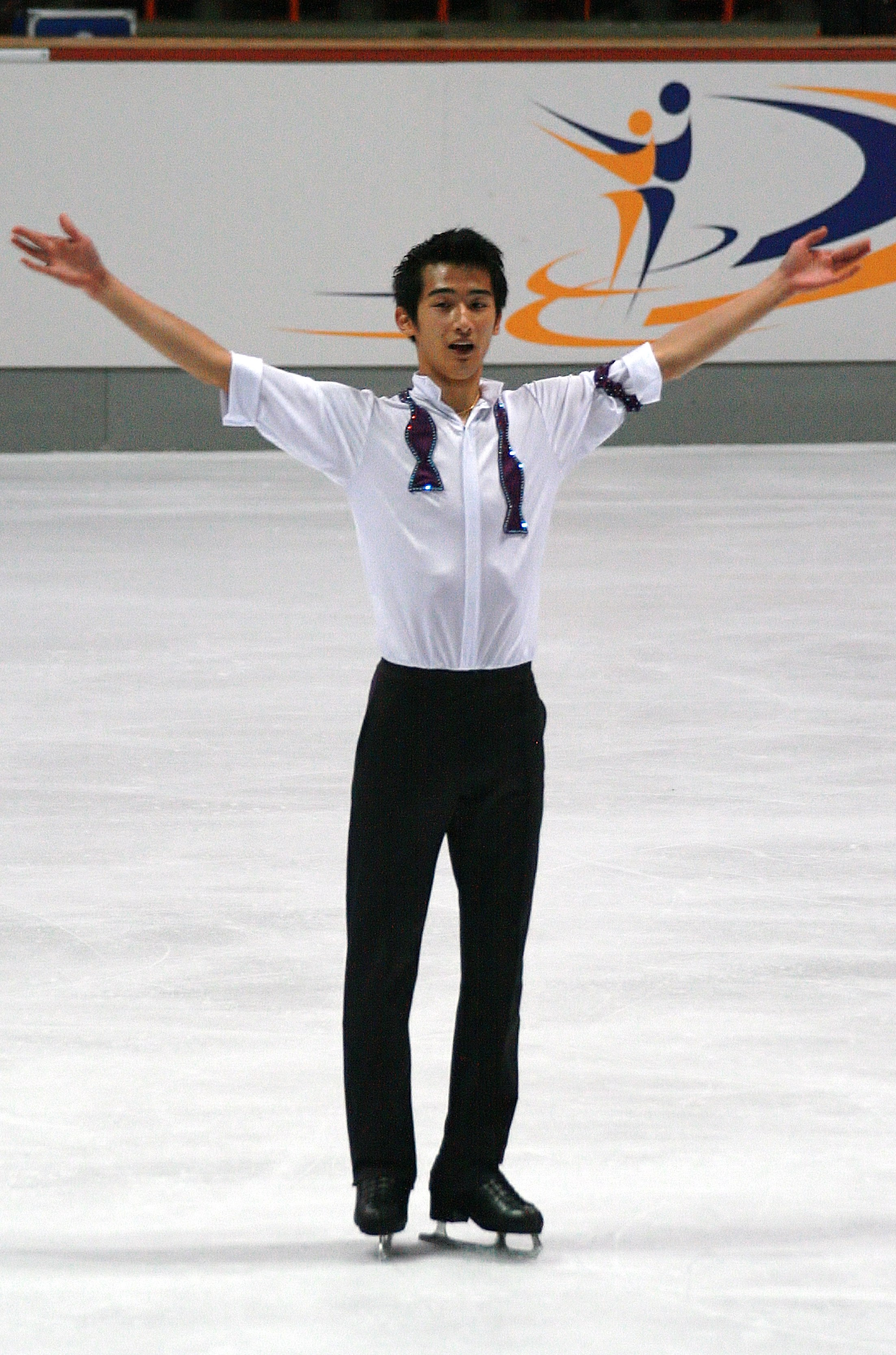 Рональд Лам (Гонконг) на 2013 Nebelhorn Trophy